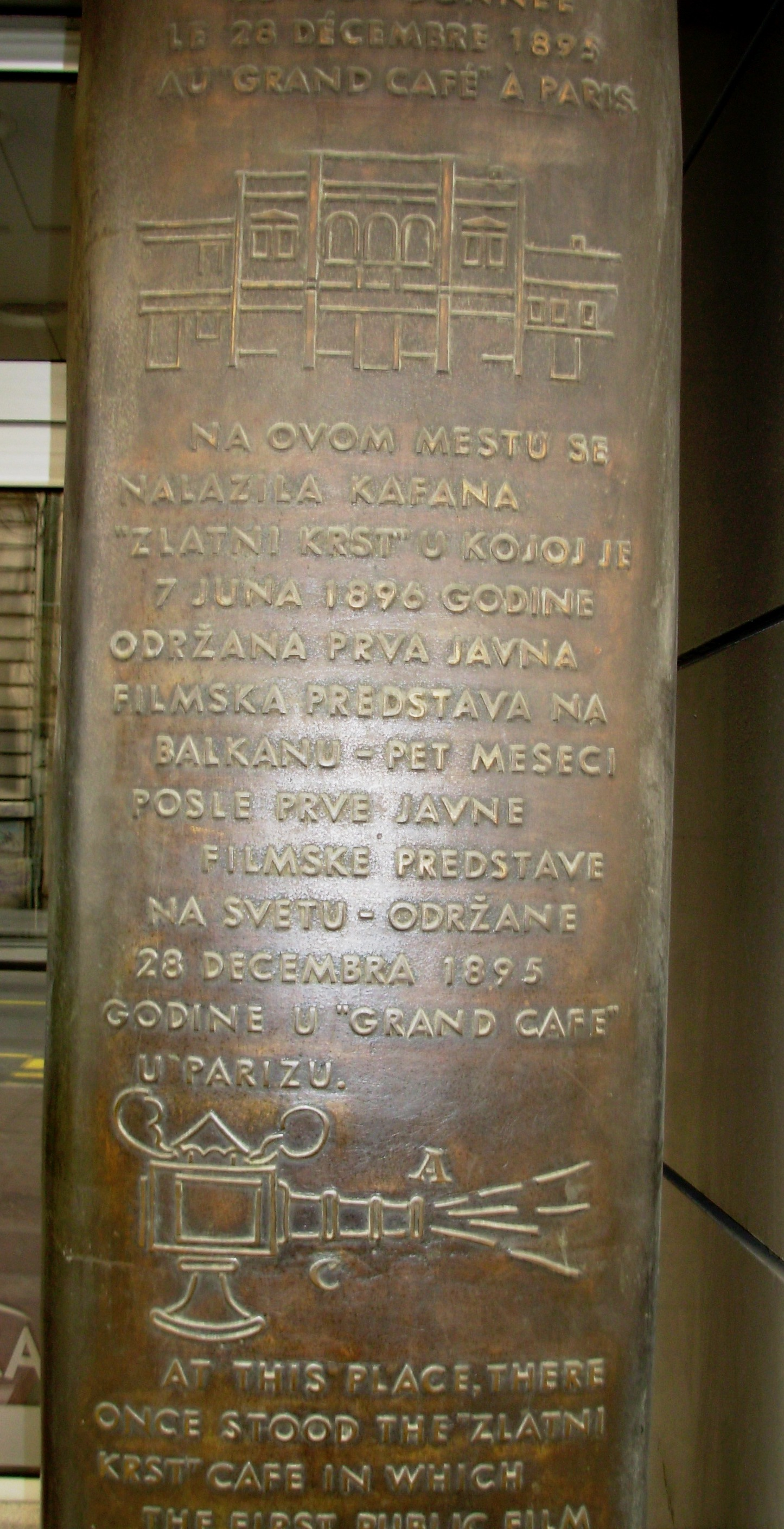 Прва филмска представа у Београду, обележје у Улици краља Милана. Сликао Голдфингер